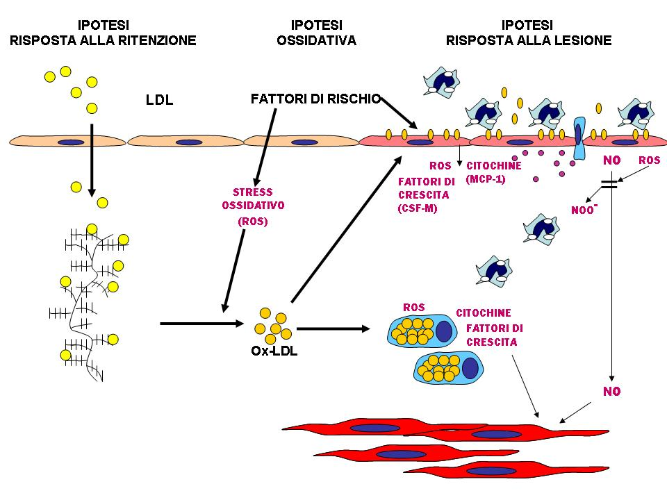 creazione personale